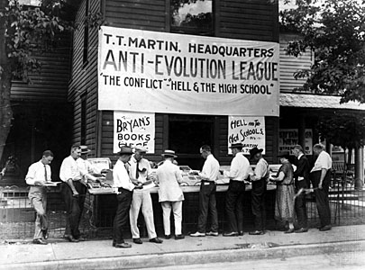 Julio 10 de 1925 Inicio del Juicio del Mono en el estado de Tennessee